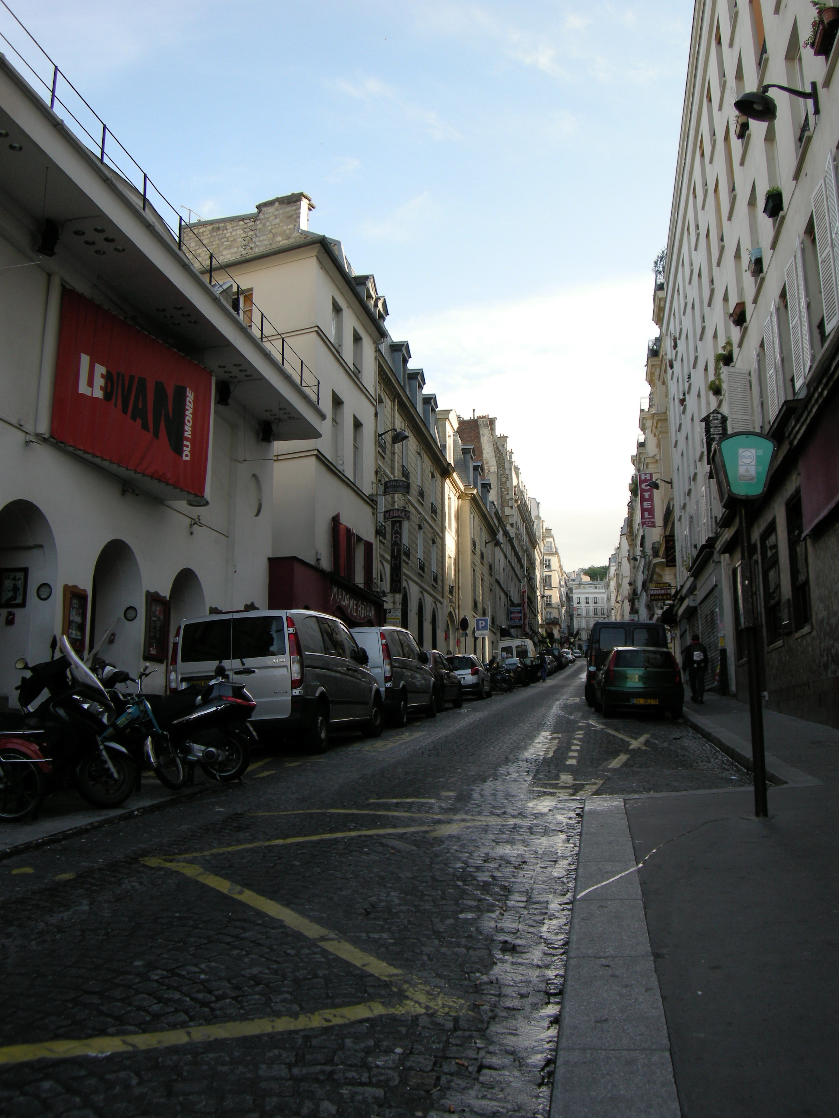 Rue des Martyrs, Paris XVIIIe, France